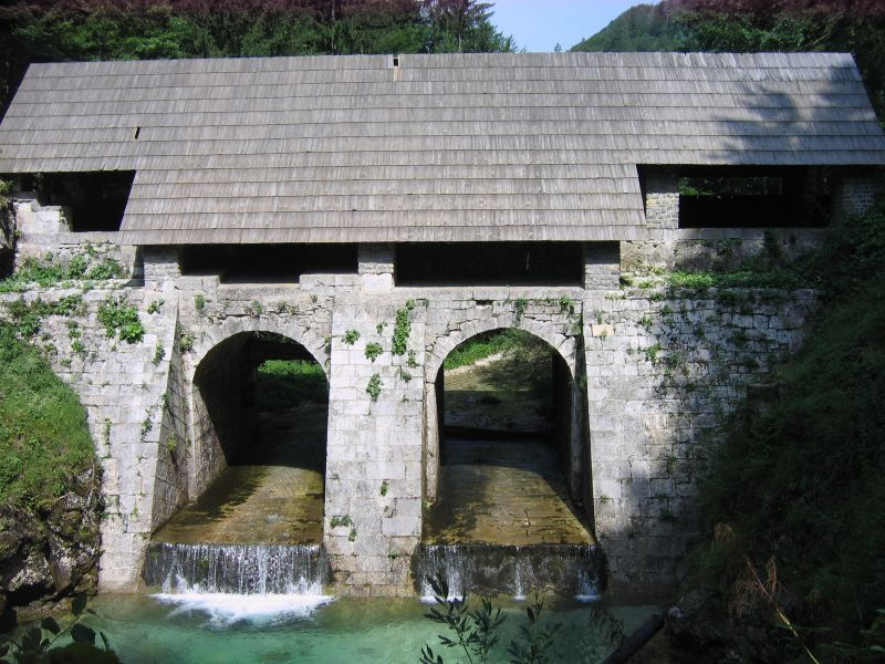 Klavže na Idrijci